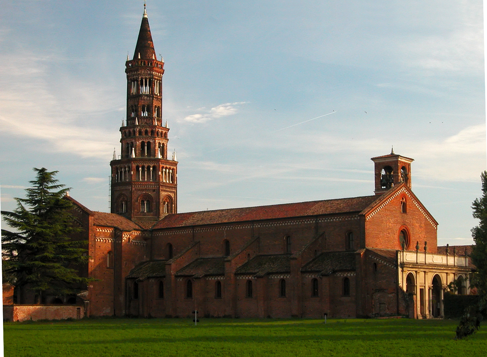 L'Abbazia di Chiaravalle a Milano. Foto da me realizzata.